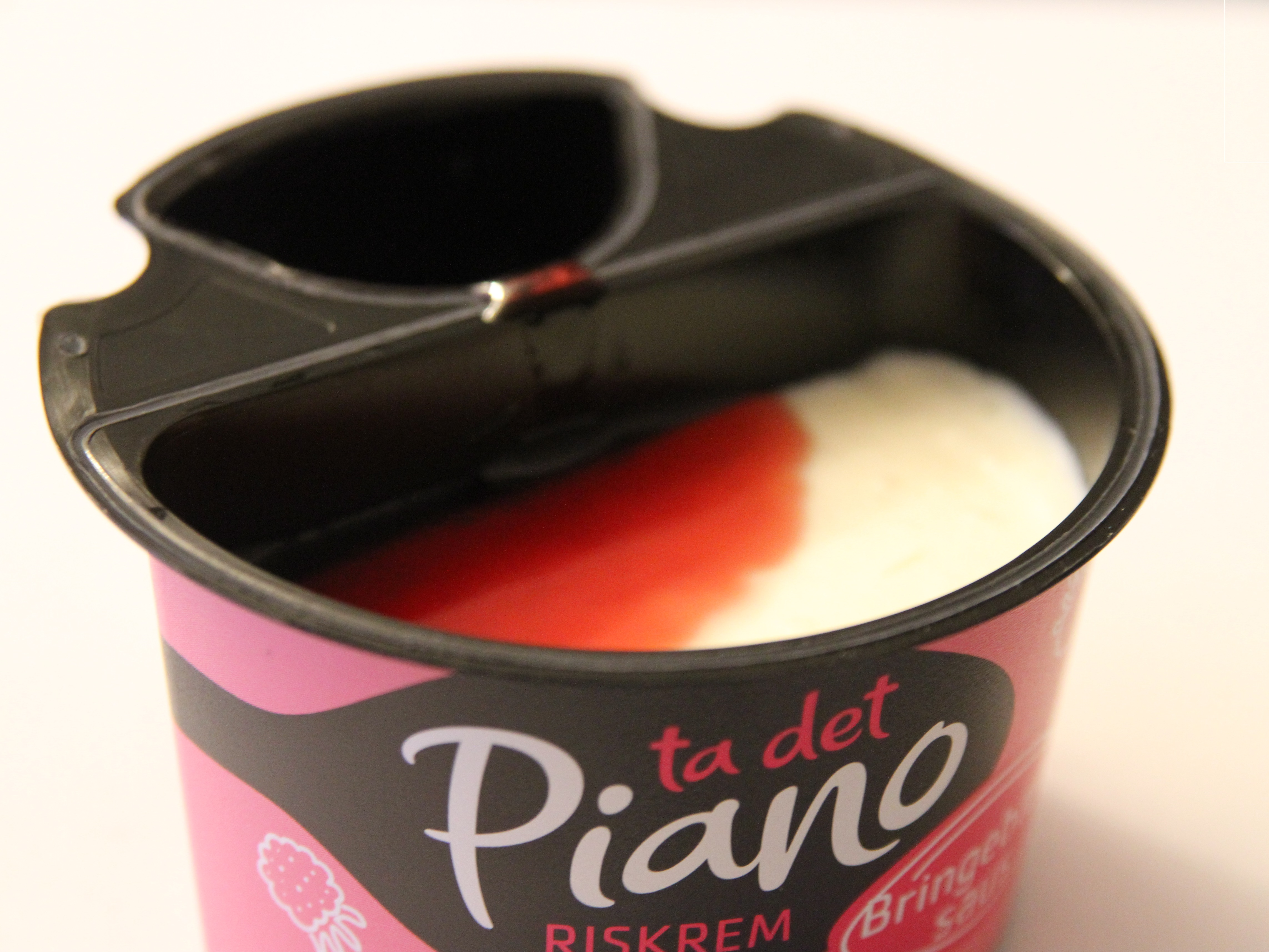 Piano Riskrem med bringebærsaus